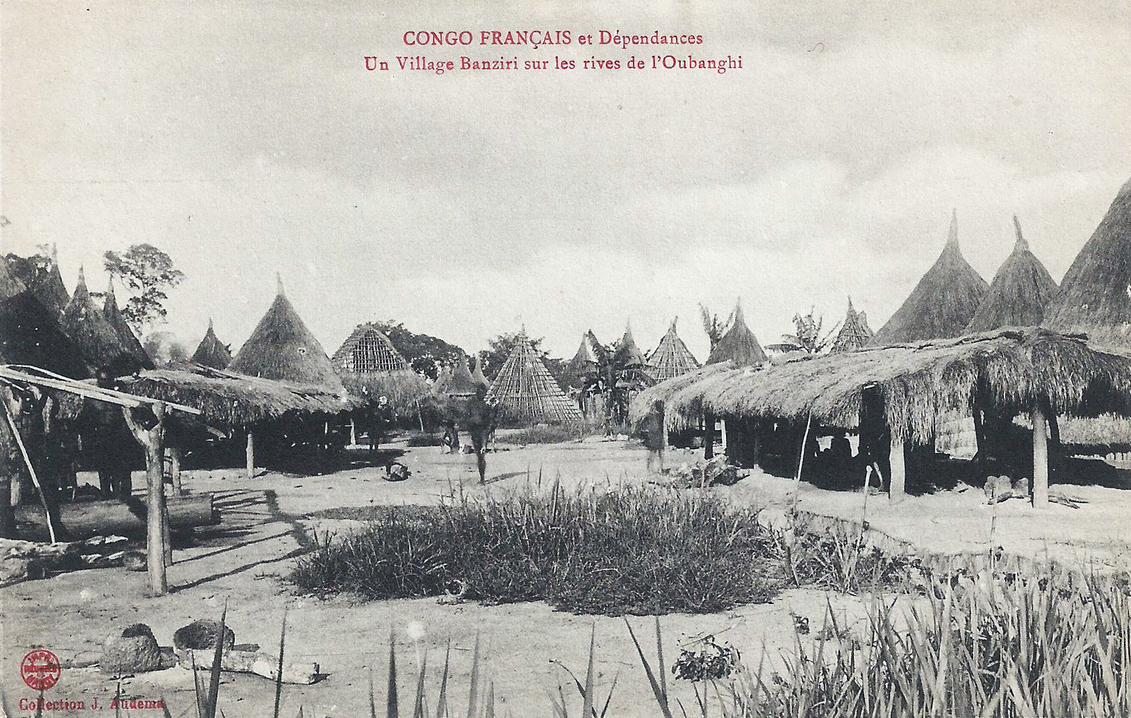 Un village Banziri sur les bords de l'Oubanghi. Collection J. Audema. Phot. A.B. & Cie, Nancy [Albert Bergeret] Congo Français et Dépendances